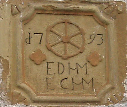 Müllerwappen (Mühlrad) aus dem 18. Jhd. in Heilbronn-Neckargartach